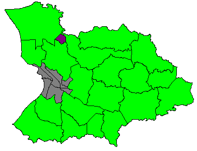 Comunidad Soledad, ubicada en el Barrio Sabanetas, Mayagüez, Puerto Rico.